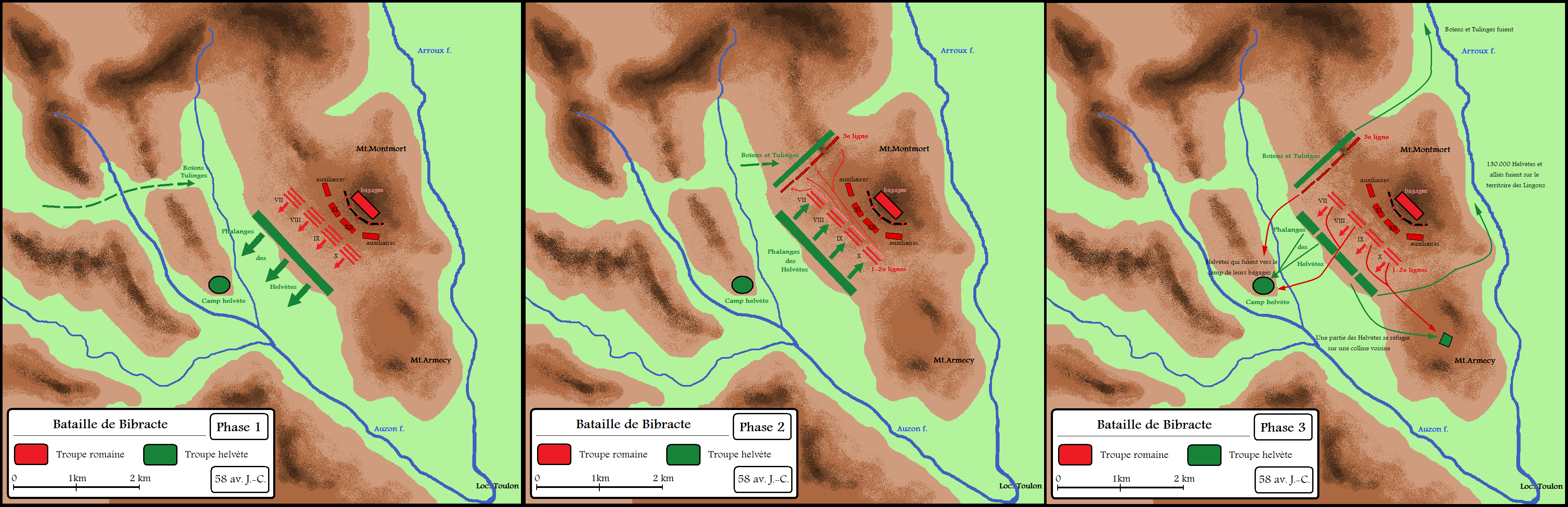 Bataille de Bibracte entre César et les Helvètes en 58 av. J.-C.